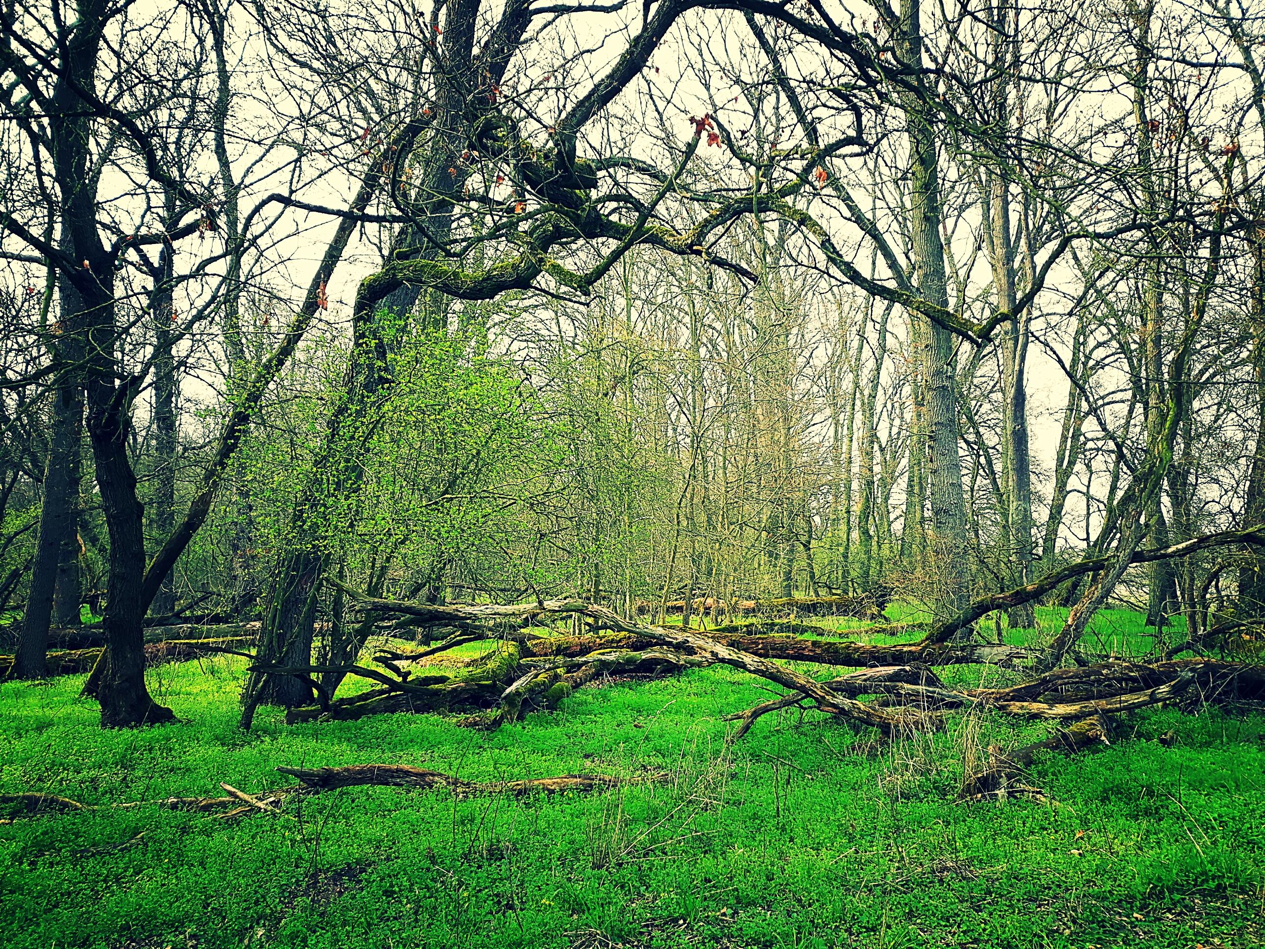 Im Lödderitzer Forst im Biosphärenreservat Mittelelbe in Sachsen Anhalt